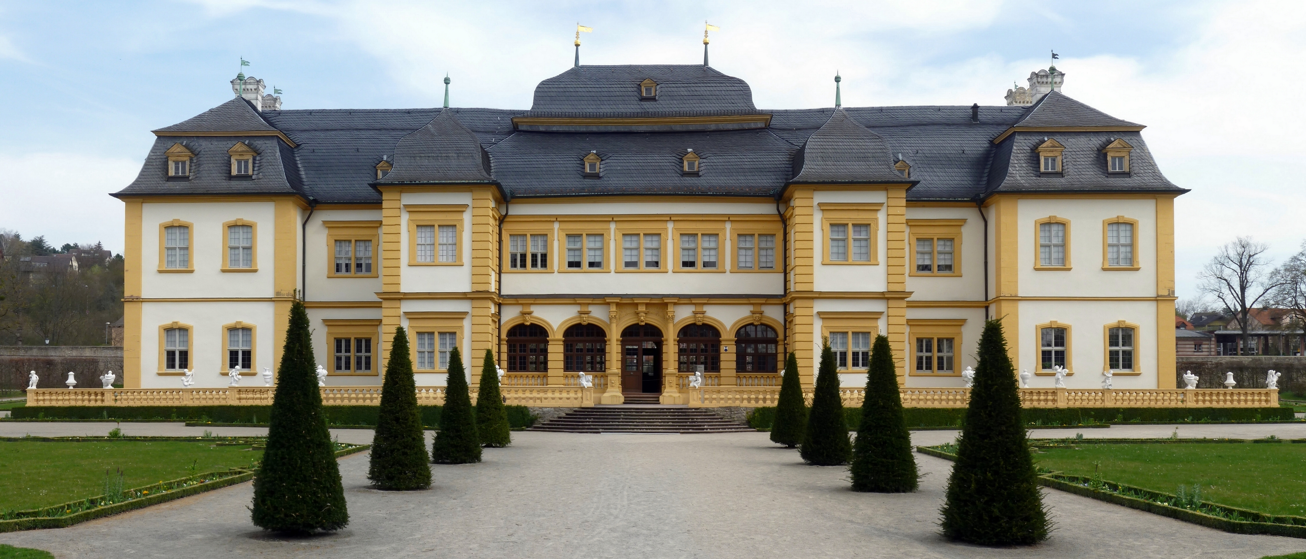 Schloss Veitshöchheim, ehemalige Sommerresidenz der Fürstbischöfe von Würzburg in Veitshöchheim bei Würzburg. Später diente das Schloss den Königen von Bayern. Erbaut wurde es von 1680 bis 1682, letzte Bauarbeiten fanden unter Johann Balthasar Neumann im Jahre 1753 statt.